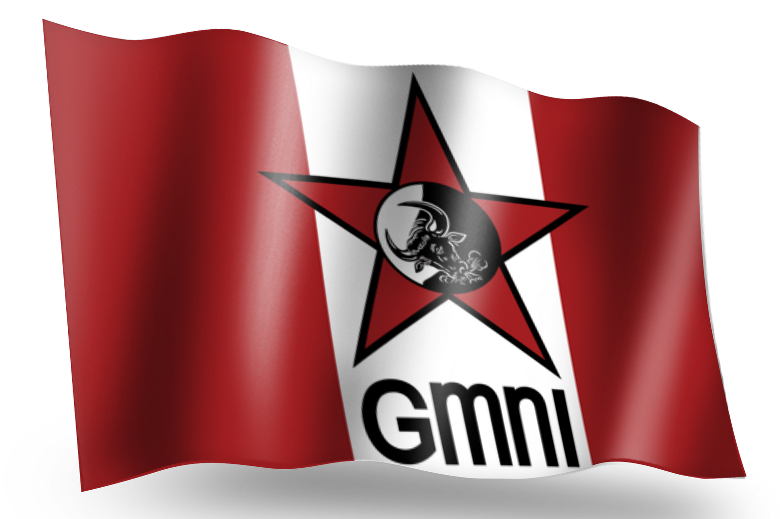 GmnI Berkibar